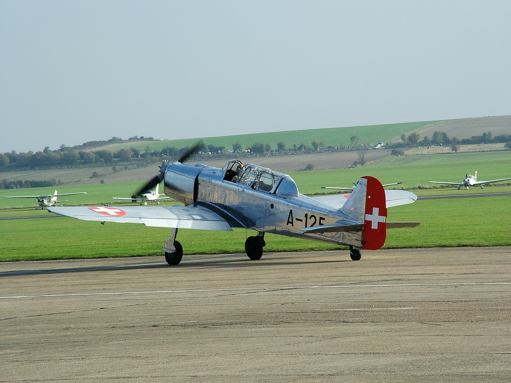 Un P-2 delle Forze Aeree Svizzere in fase di decollo.